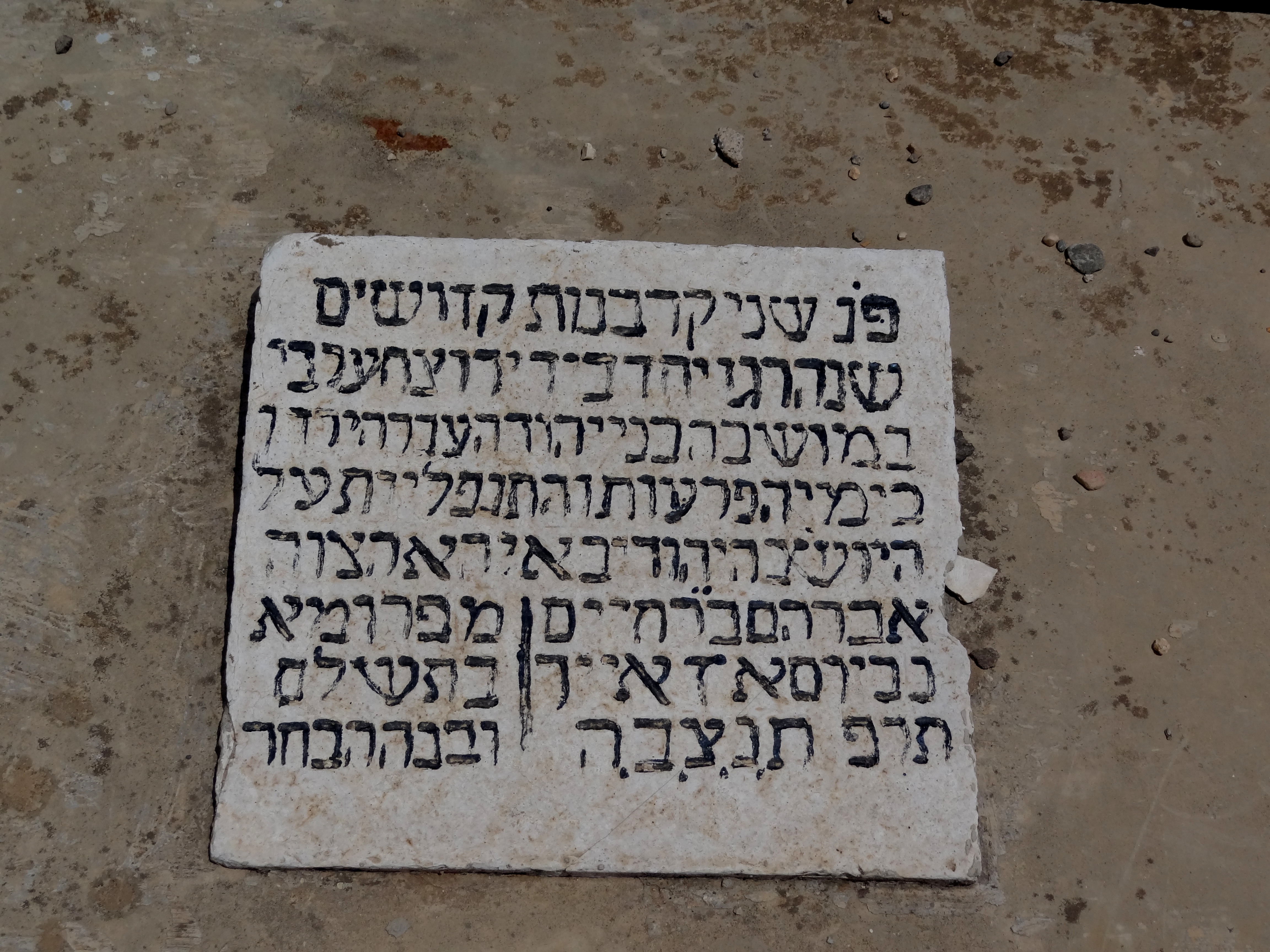 הקברים של בני משפחת ברנשטיין. שהתיישבו בתחילת המאה ה-20 במושבה בני יהודה ברמת הגולן בשנת 1920 רצח שכן ערבי את פרומא אם משפחת ברנשטיין ואת בנה אברהם הקברים נמצאים בבית הקברות הישן של טבריה בקבר מס' 1687 חלקה ב' אזור א, הכתובת על הקברים: פ"נ (פה נטמנו) שני קרבנות קדושים שנהרגו יחד בידי רוצח ערבי במושבה בני יהודה עבר הירדן בימי הפרעות והתנפליות (ההתנפלויות) על היושב (שגיאת כתיב, צ"ל "הישוב") היהודי באי (בארץ ישראל) האהצוה (האשה הצנועה והחסודה מ (מרת) פרומא בת שלם (שלום?) ובנה הבחר (הבחור) / אברהם ב"ר (בן רבי) חיים נ (נפטרו) ביום א ז אייר תרפ (יום ראשון, 25/4/1920) ת,נ,צ,ב,ה (תהא נשמתם צרורה בצרור החיים)